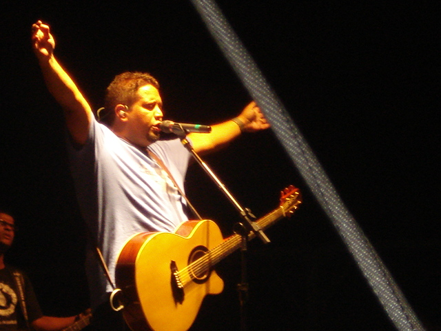 Fernandinho tocando e cantando em um show